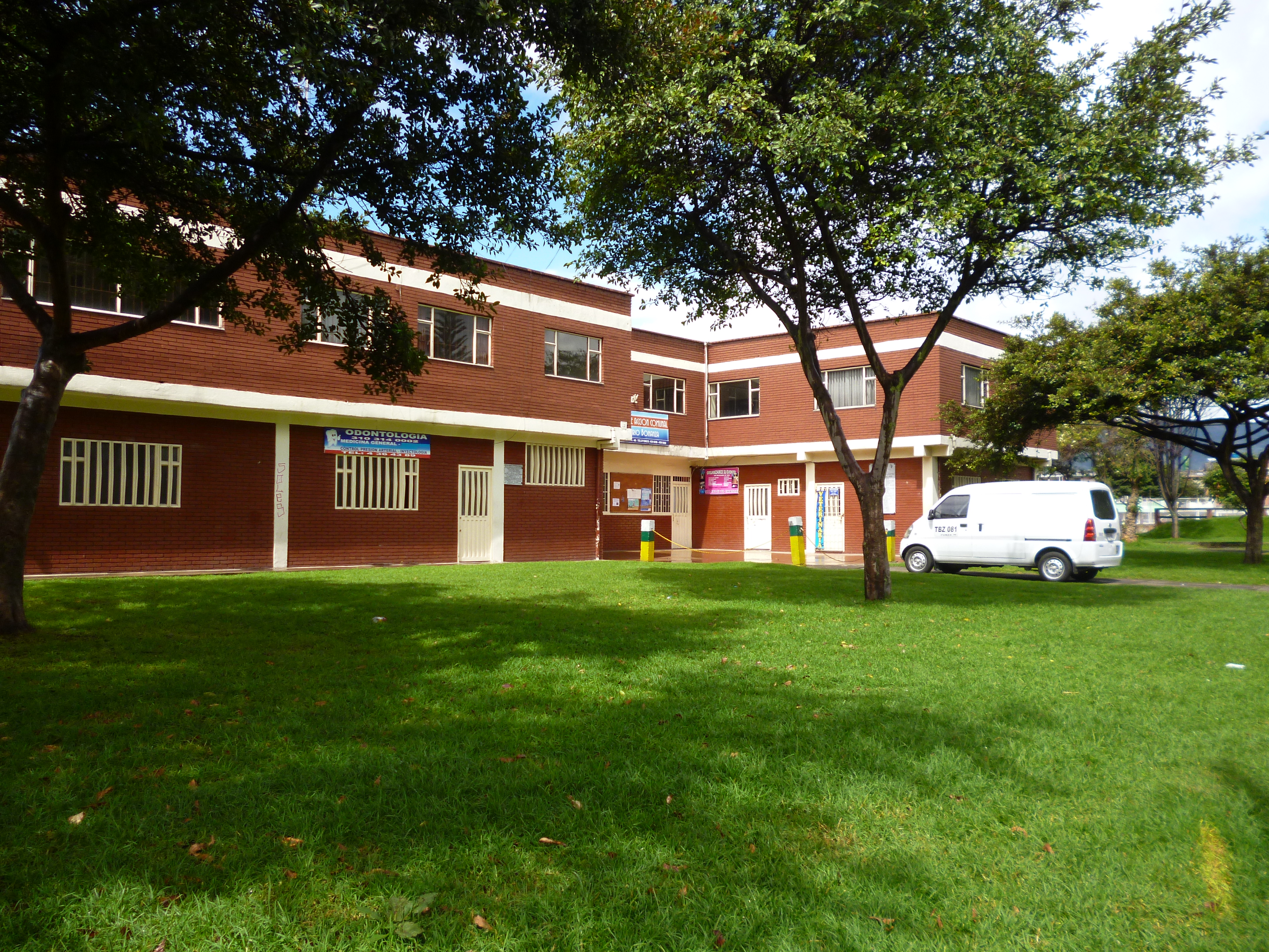 barrio de bogotá